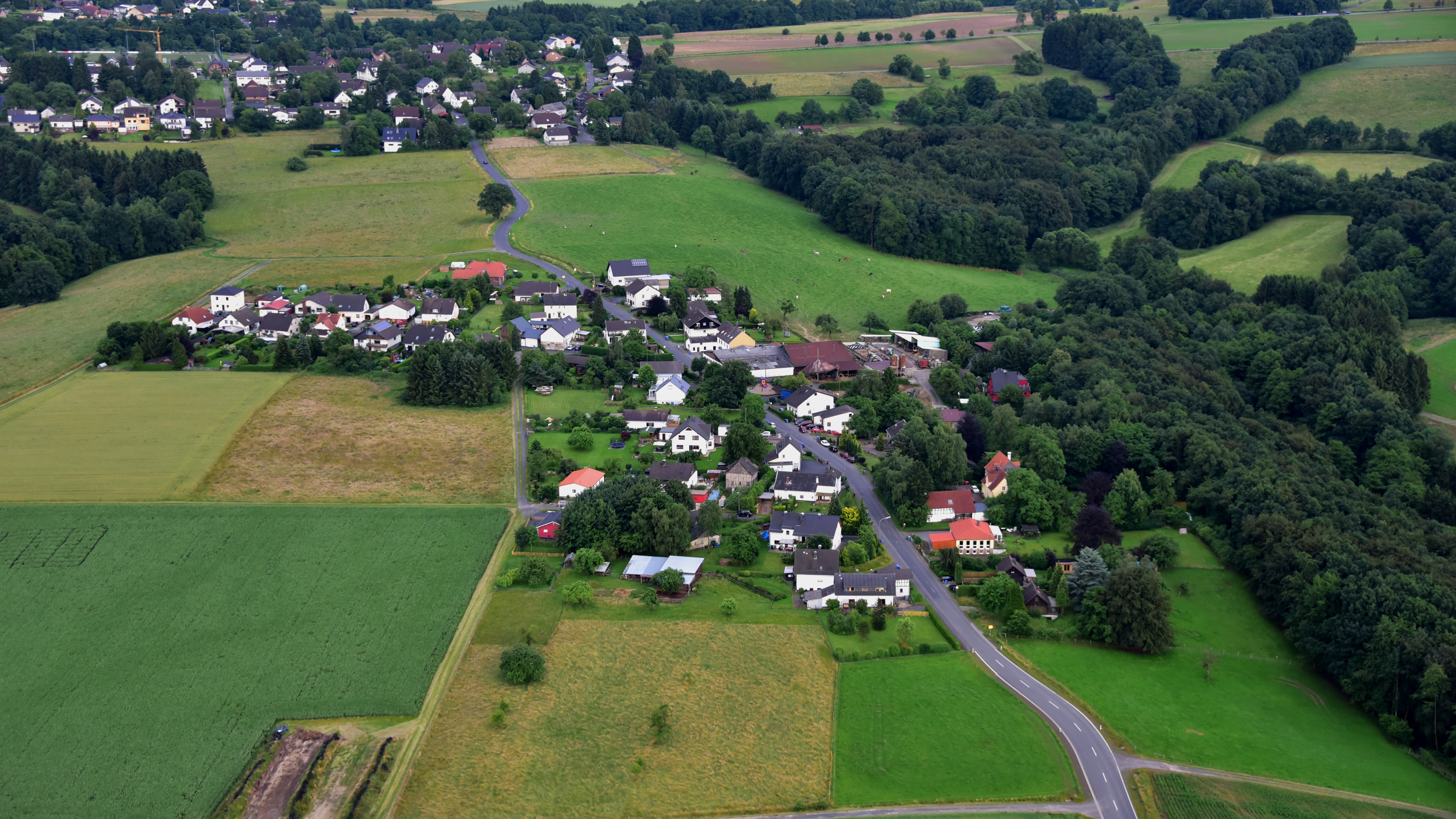 Buchholz (Westerwald), Hammelshahn, Luftaufnahme (2016)